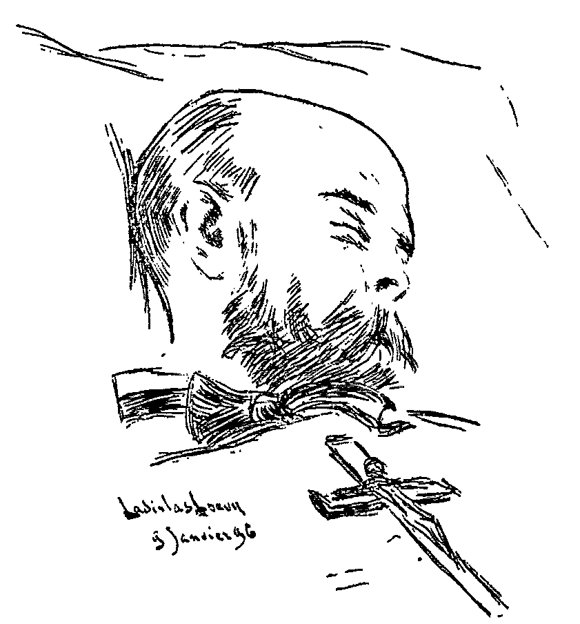 Paul Verlaine sur son lit de mort. Portrait of French poet Paul Verlaine (1844-1896) on his death-bed.